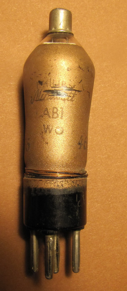 Lampa AB1 produkcji Philipsa, duodioda detekcyjna/ARW